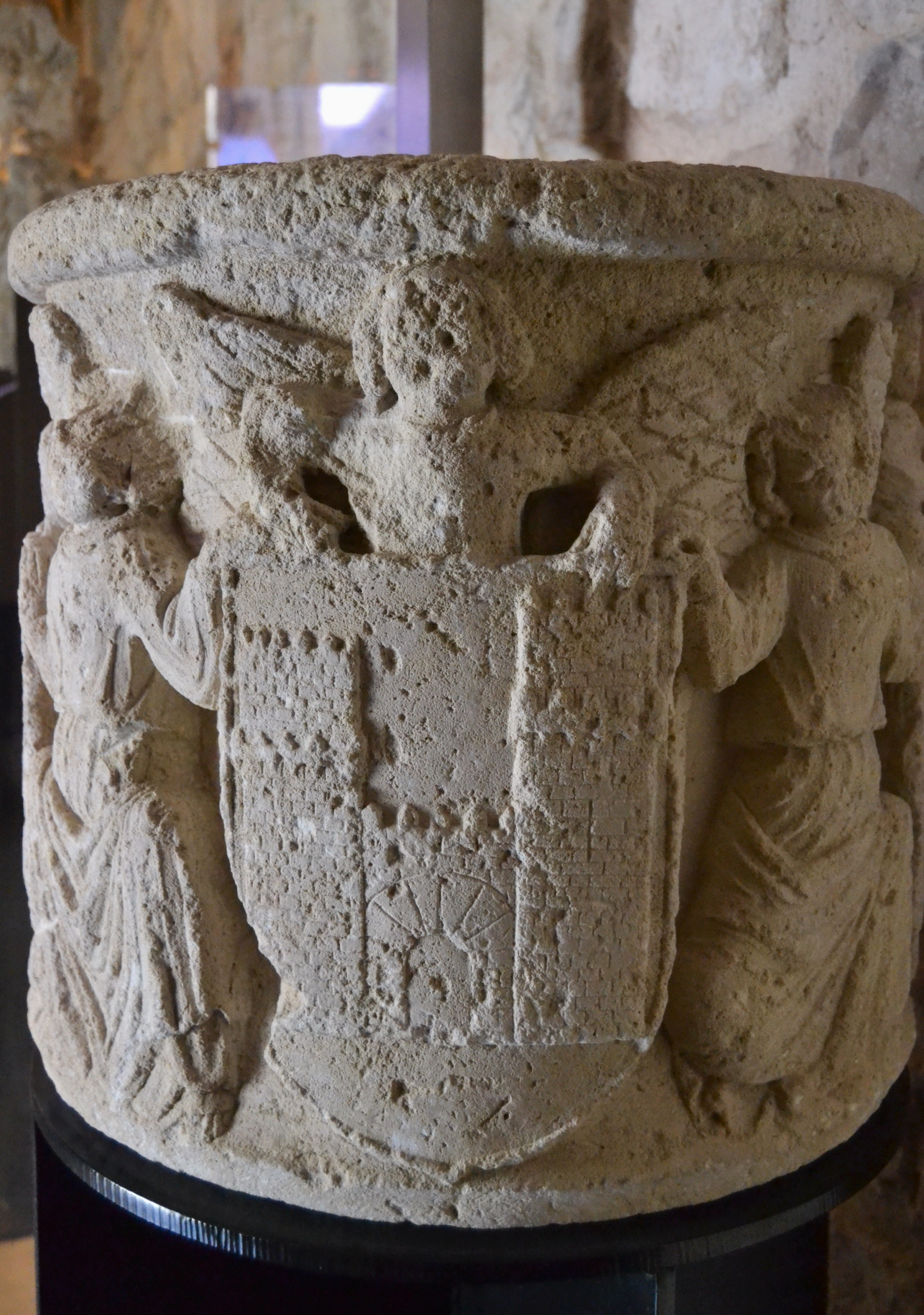 Tambor d'una creu de terme (escut), segle XV, museu Arqueològic i d'Història, Elx. Decorat per parelles d’àngels que sostenen escuts cívics amb portes envoltades de torres. Procedència desconeguda.